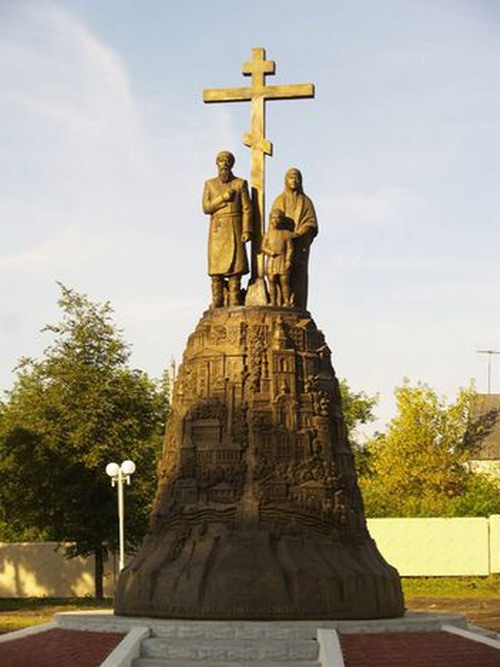 памятник установленный в честь основателям города Клинцы